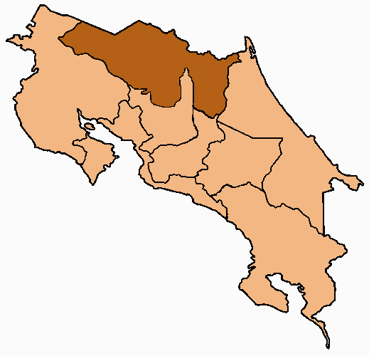 Mappa della diocesi di Ciudad Quesada, in Costa Rica. Lavoro personale, eseguito a partire da questa immagine di Commons. Fonte per i confini delle diocesi